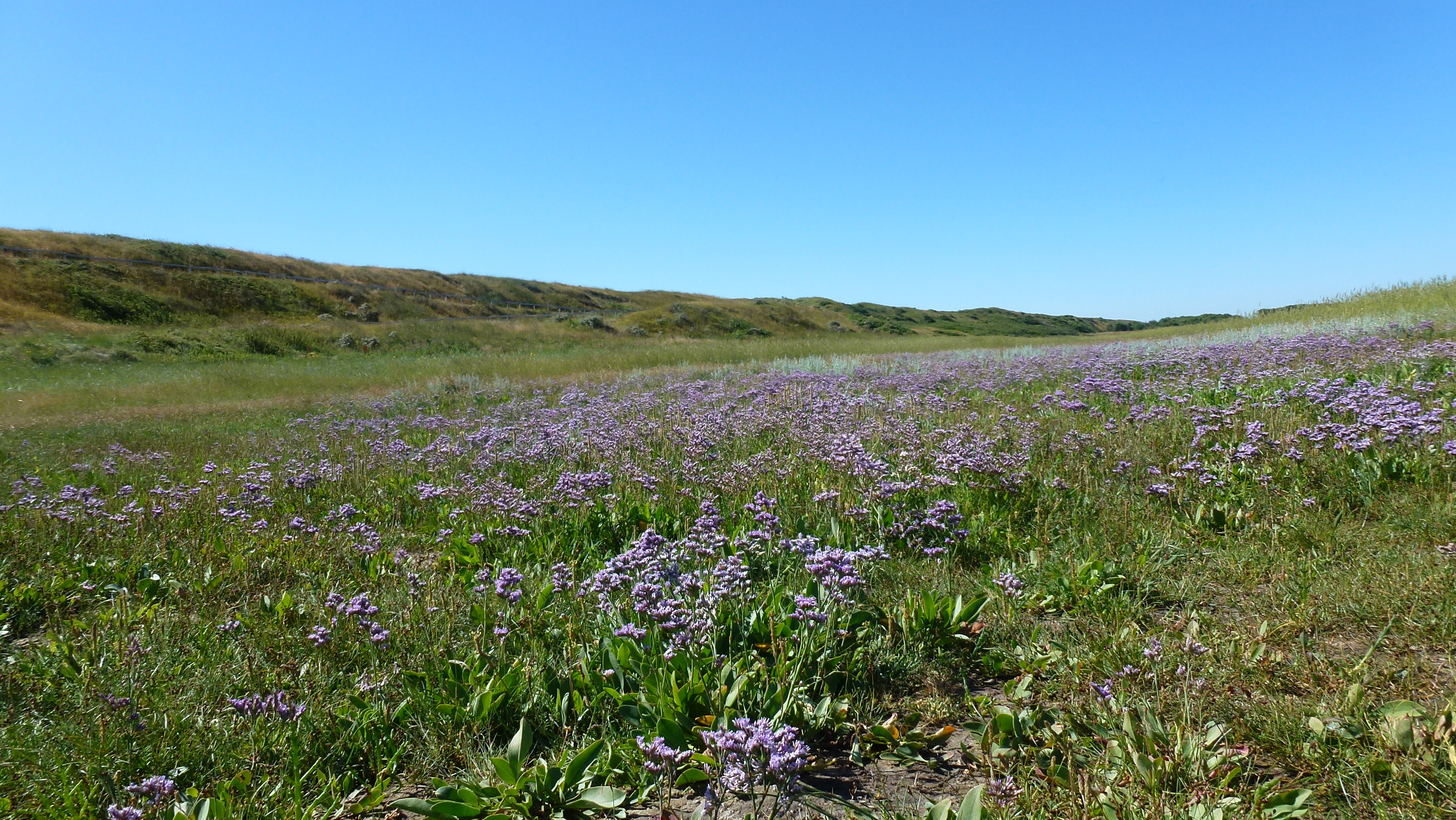 Natuurgebied De Slufter op Texel in de maand juli met Lamsoor in bloei